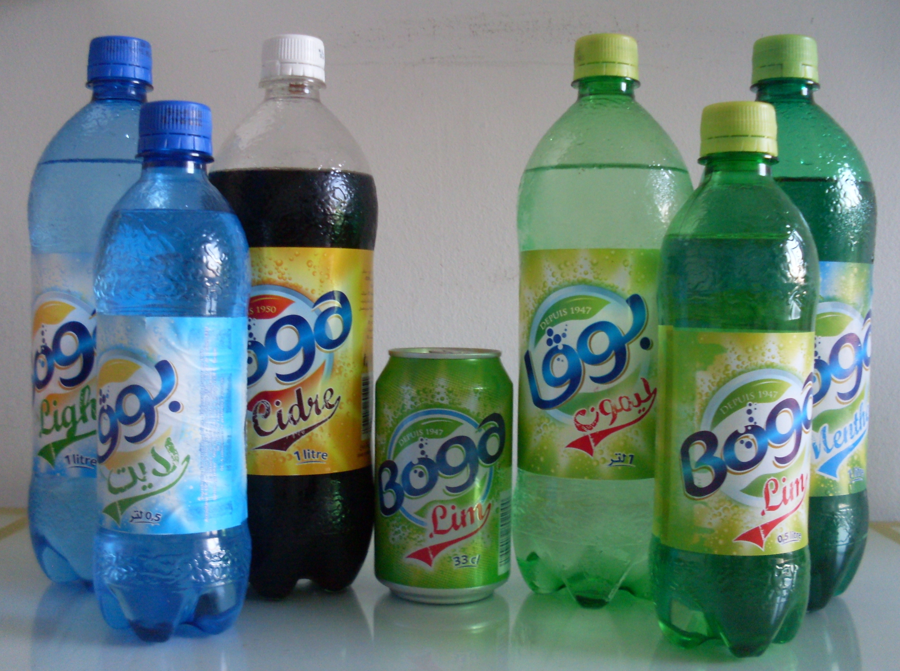 Une partie de la gamme Boga, Boisson gazeuse Tunisienne